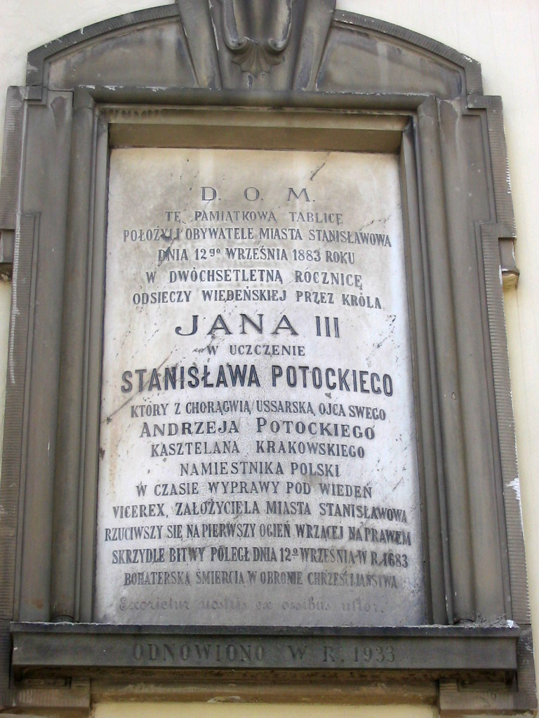 Memorial Plate in Polish, Ivano-Frankivsk, Ukraine